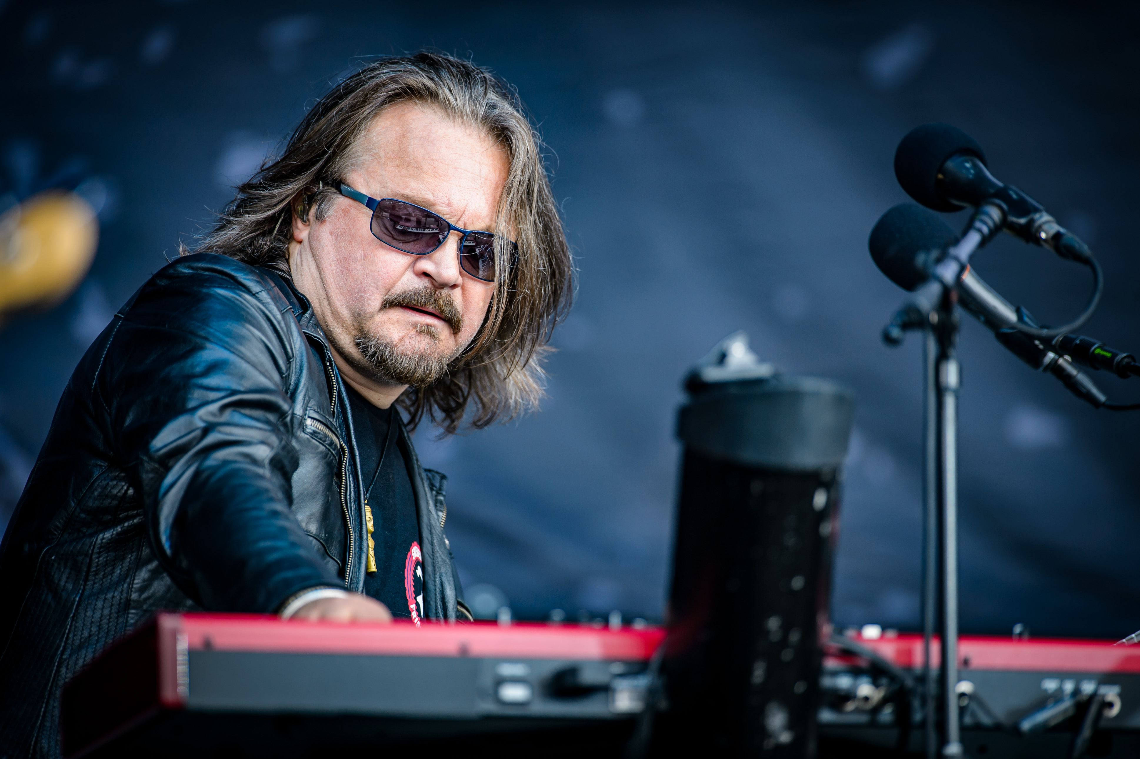 'Wacken Open Air 2017; Wacken': 'Europe'